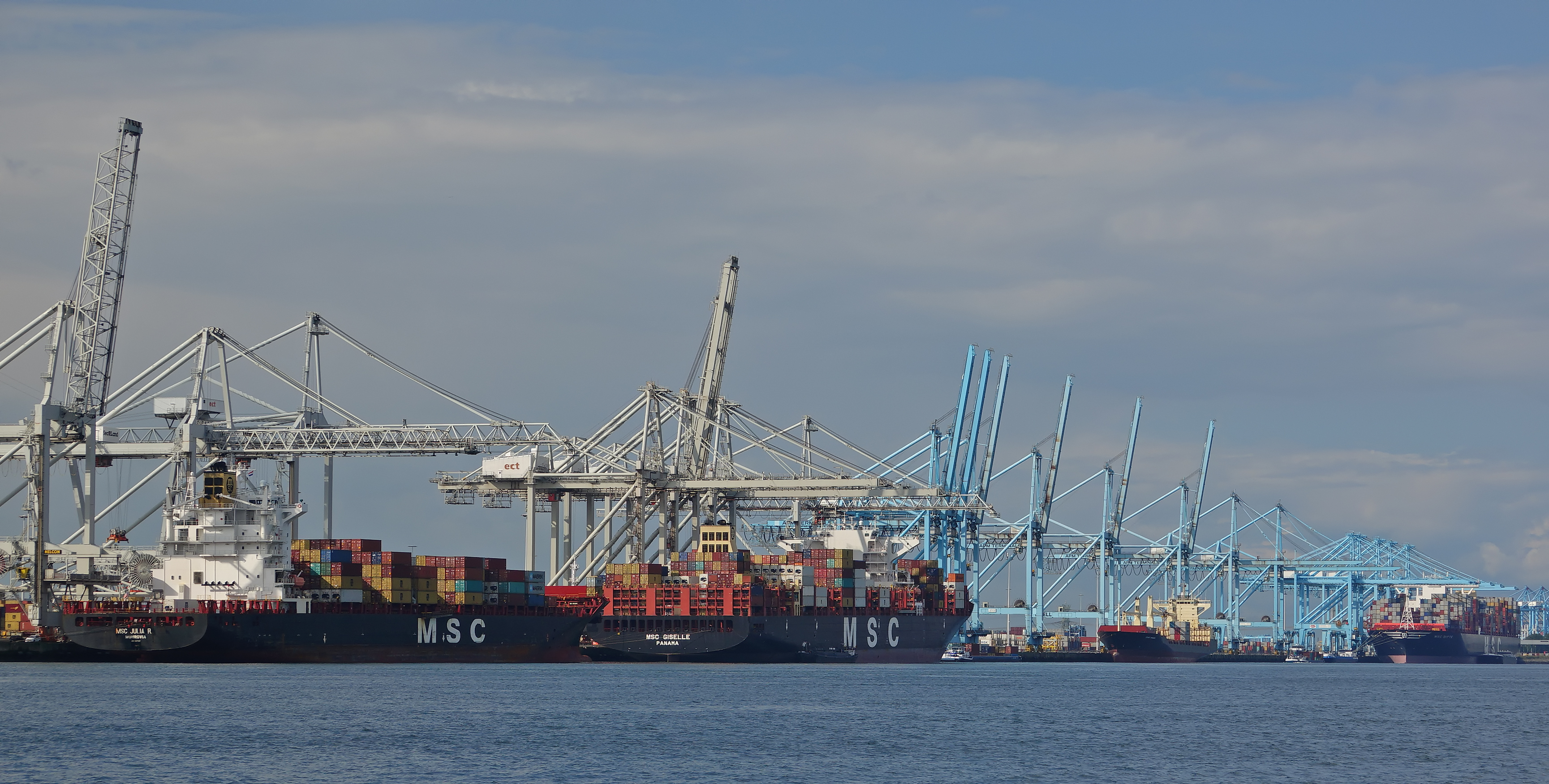 19-9-2017 Europahaven Maasvlakte 1